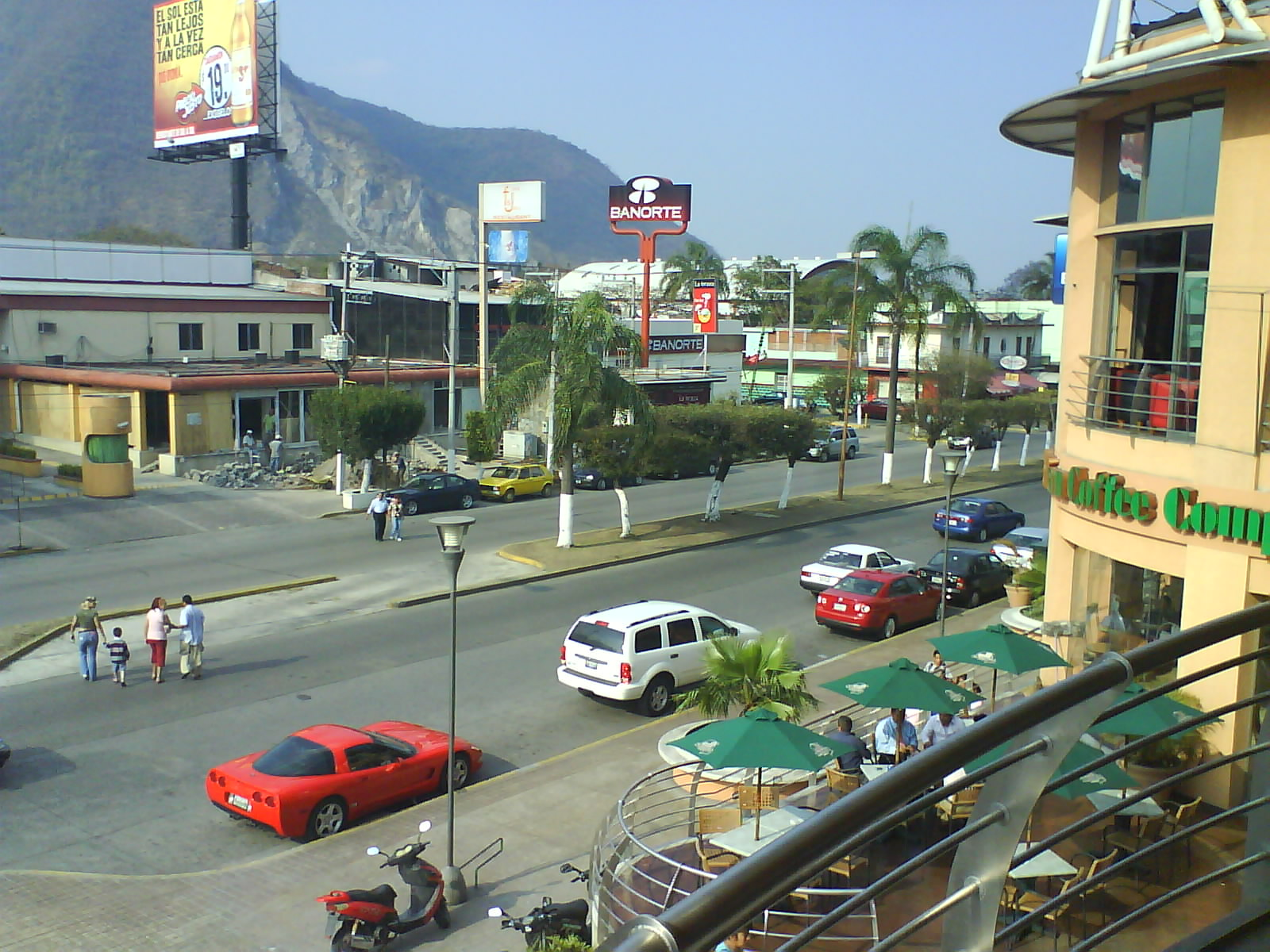 Orizaba Calle 6 view from La Parroquia cafe.